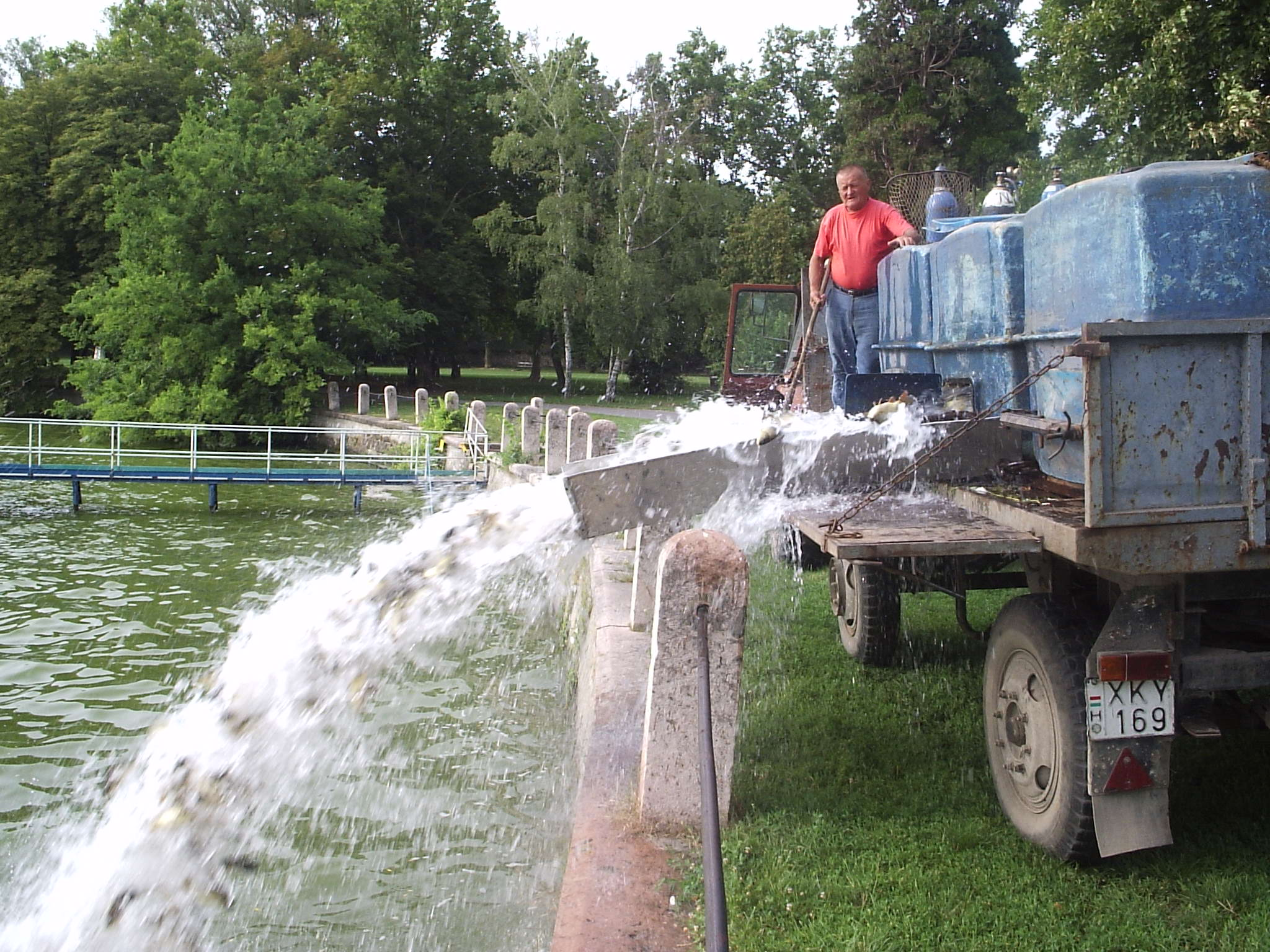 Fish deployment in Old Lake (Öreg-tó) Photo: József Süveg (2005)